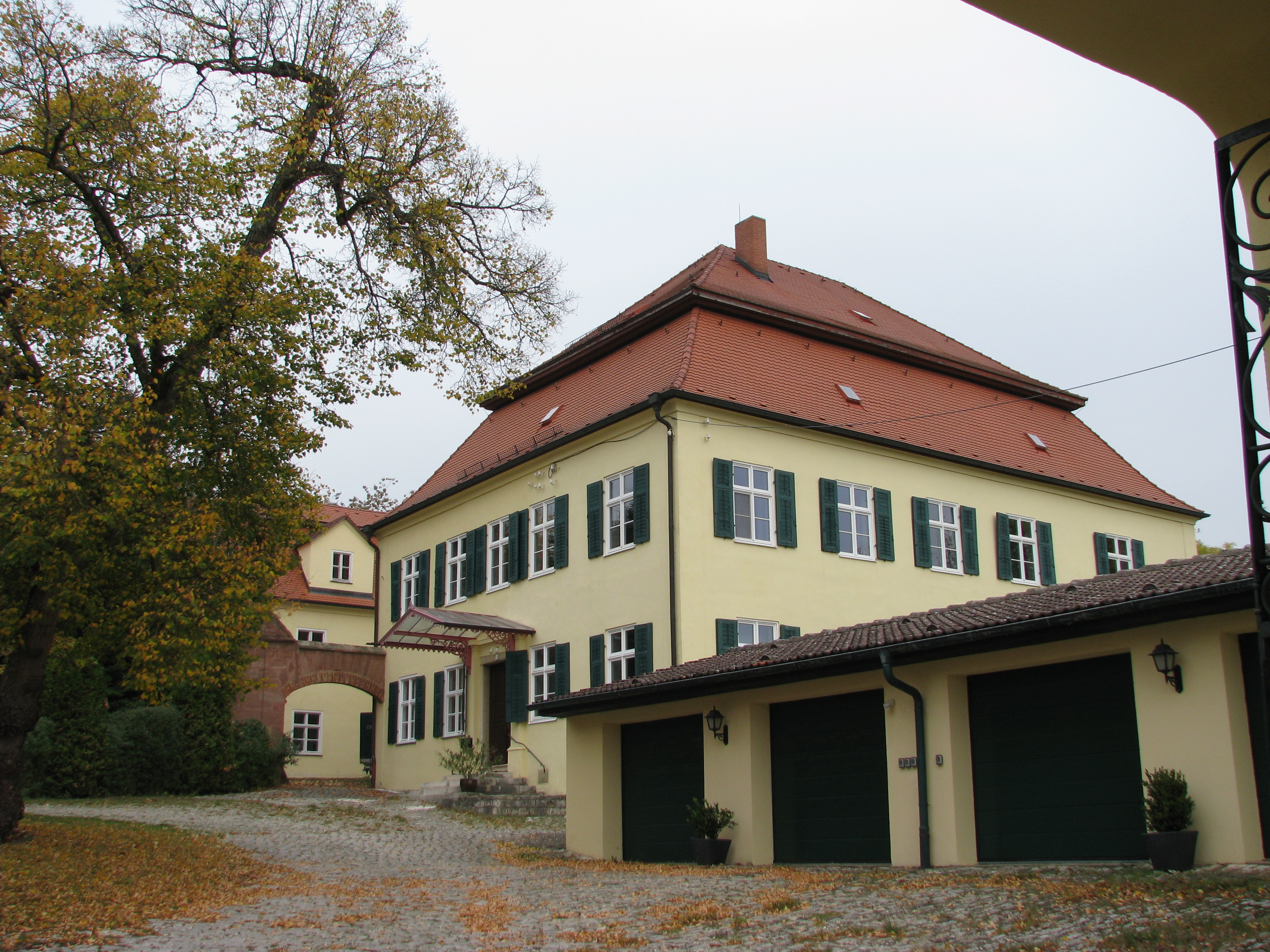 Kreuth (Schloßkreuth), Ortsteil von Heideck im mittelfränkischen Landkreis Roth, Schlossgebäude (18. Jahrhundert)